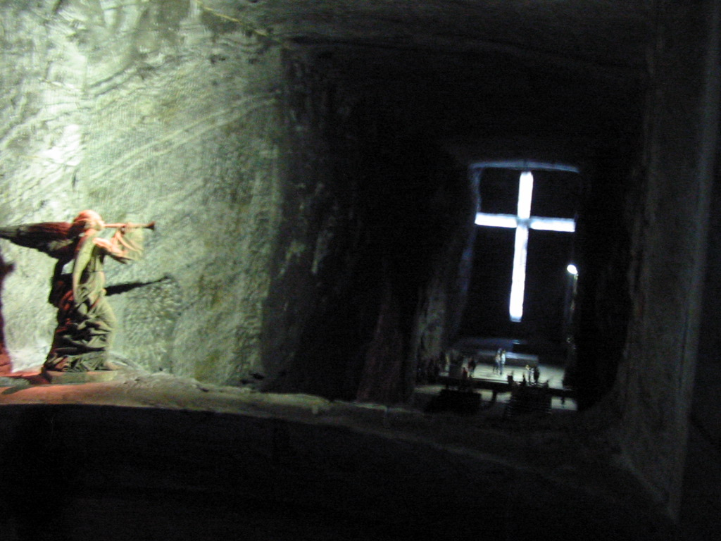 Nave principal de la Catedral de Sal. El altar al fondo Zipaquirá, Cundinamarca, Colombia